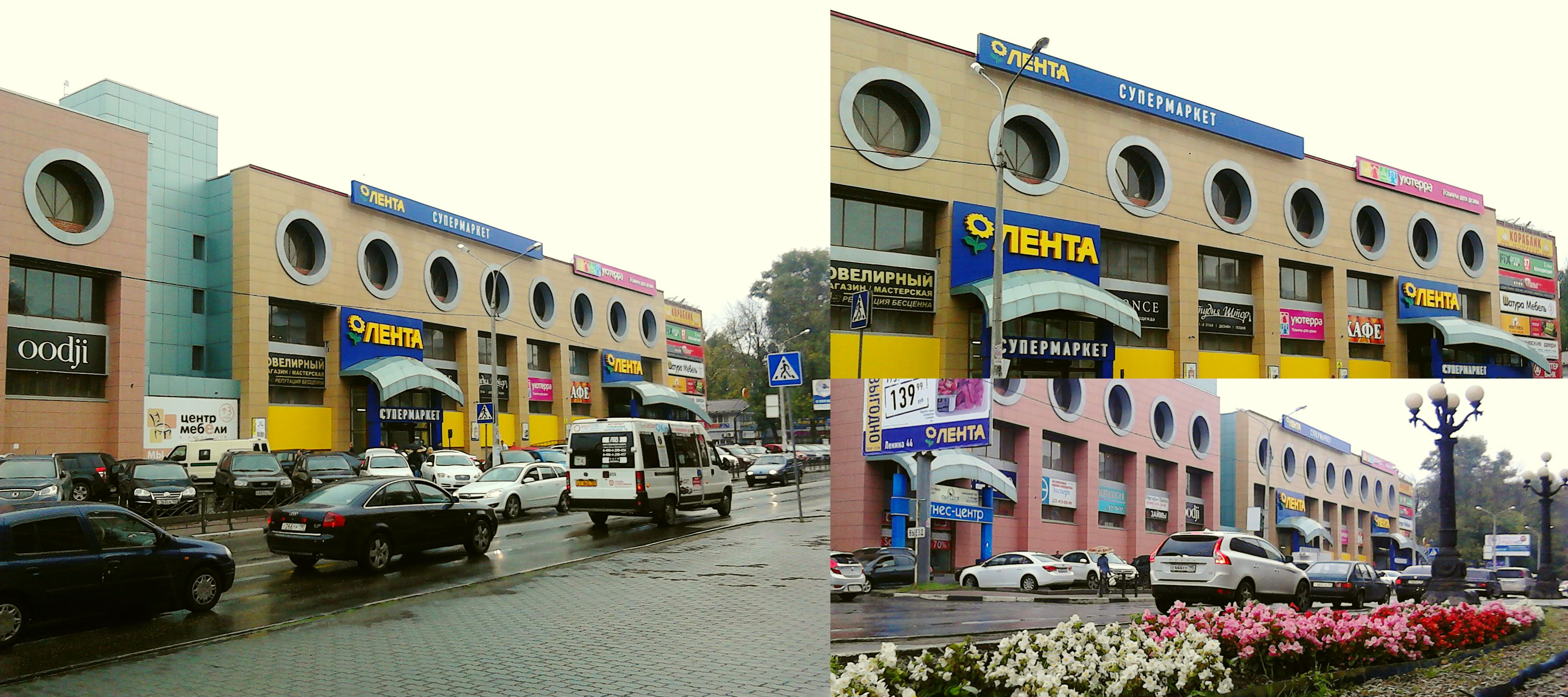 Торговый центр "Никольский" г. Орехово-Зуево, август 2013